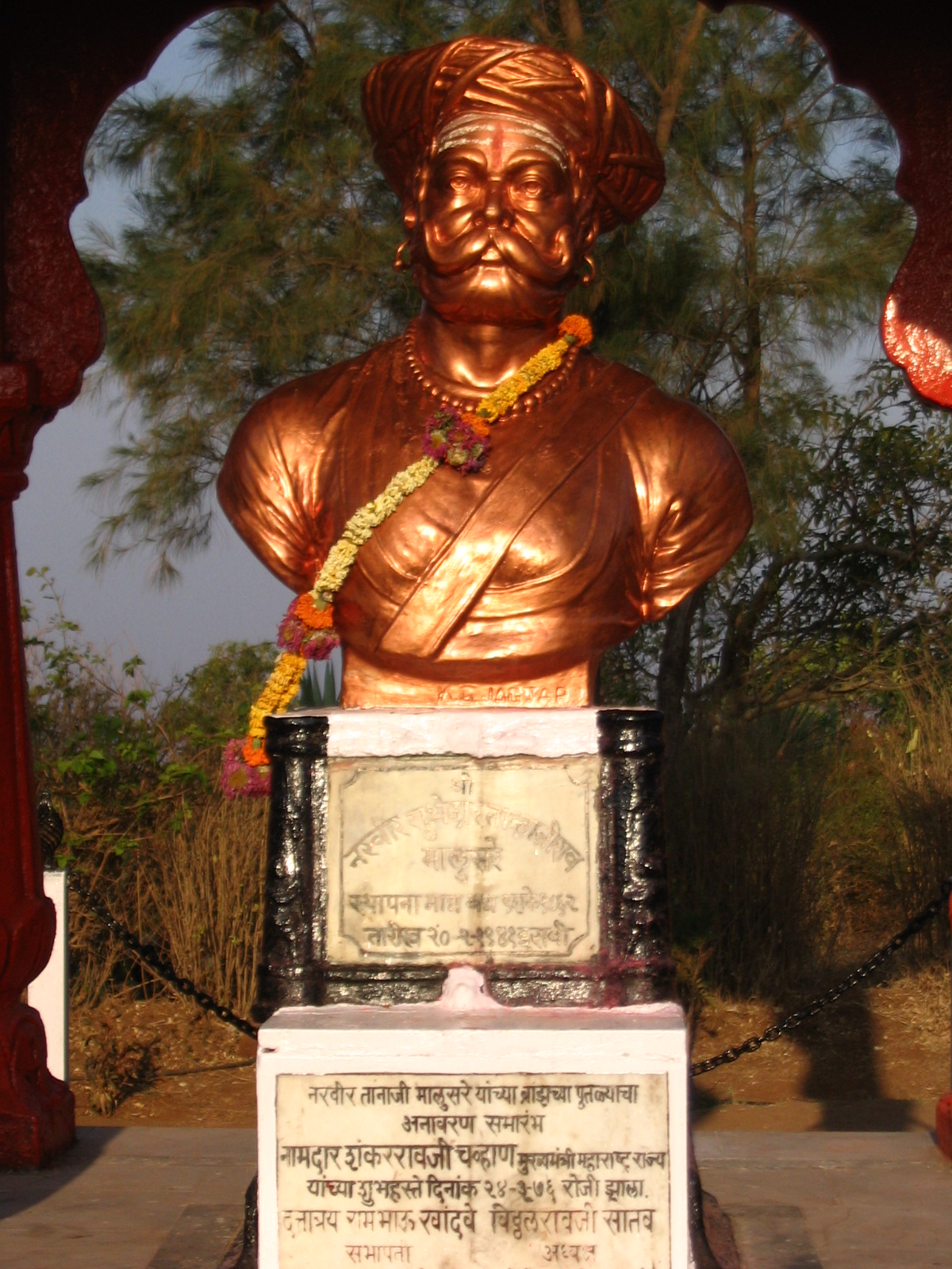 Bronze bust of Tanaji Malusare, Sinhagad, Maharashtra, India